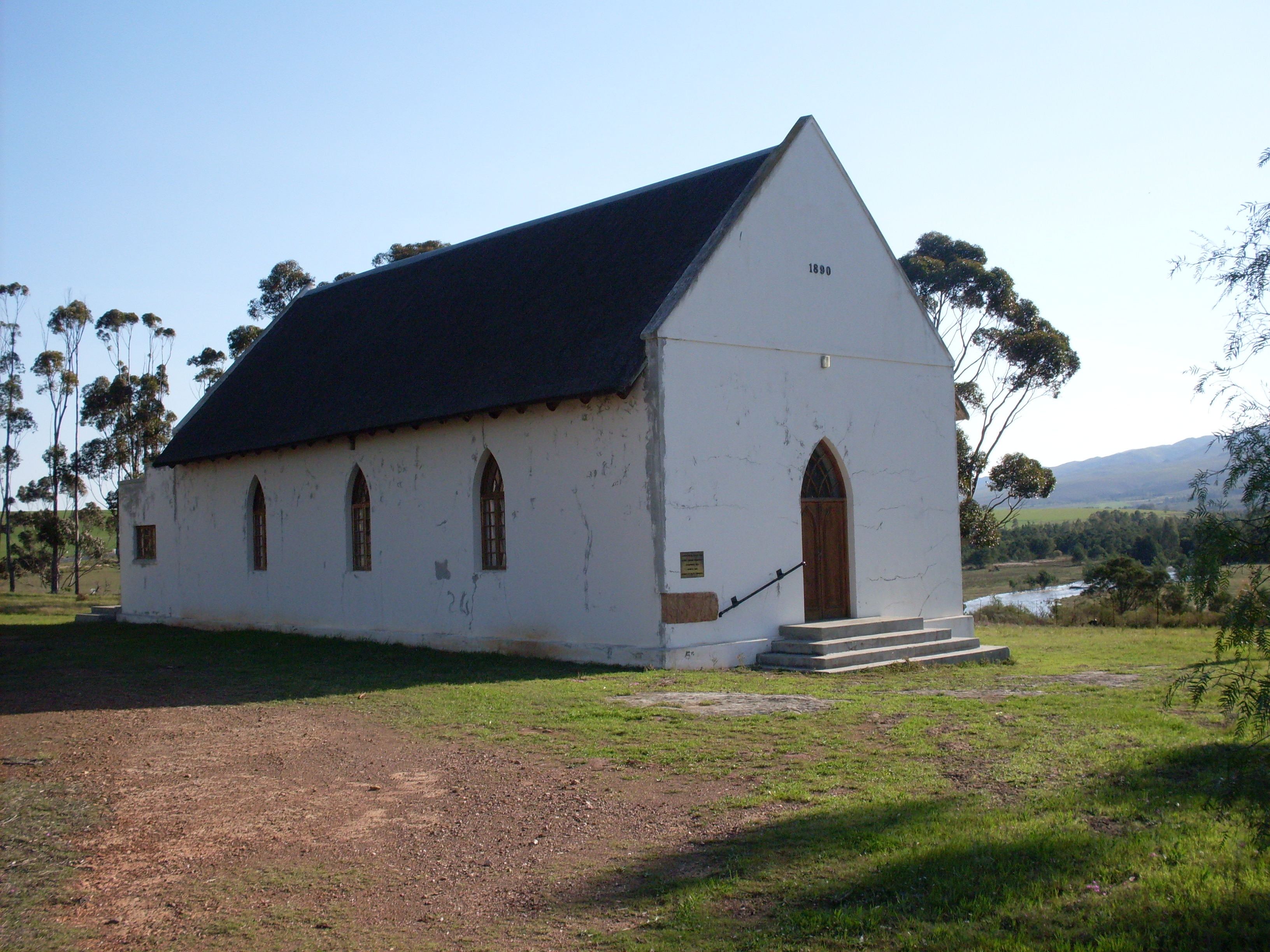 Stormsvleikerk